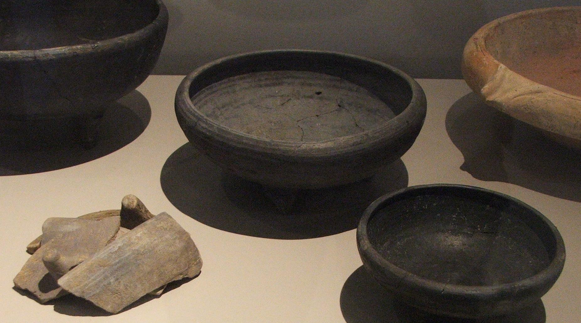 Bols tripodes retrouvés sous la place de la république et datant de l'époque de la ville de Vindunum, soit les trois premiers siècles de notre ère.